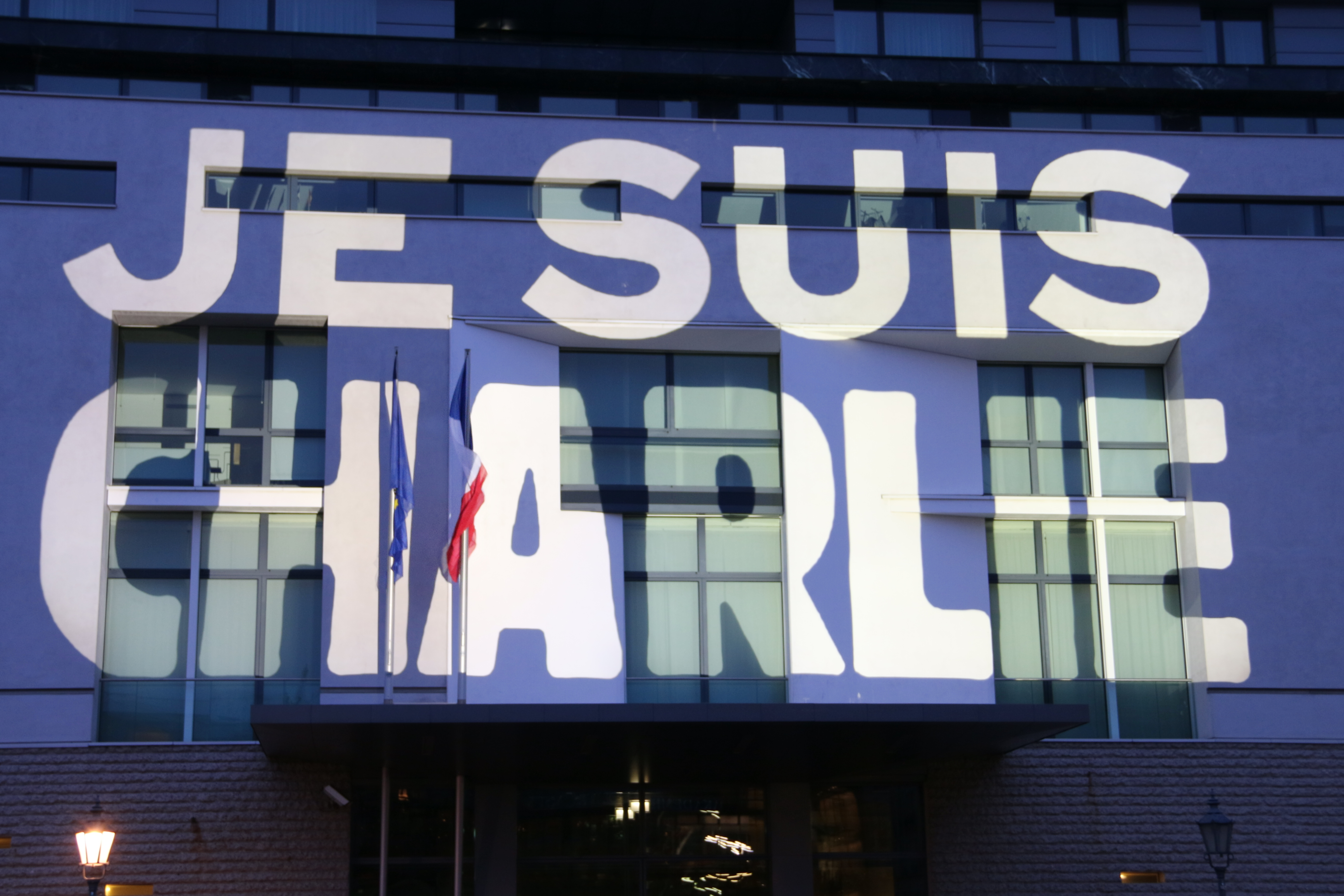 Mahnwache vor der französischen Botschaft in Berlin The making of this document was supported by the Community-Budget of Wikimedia Germany.